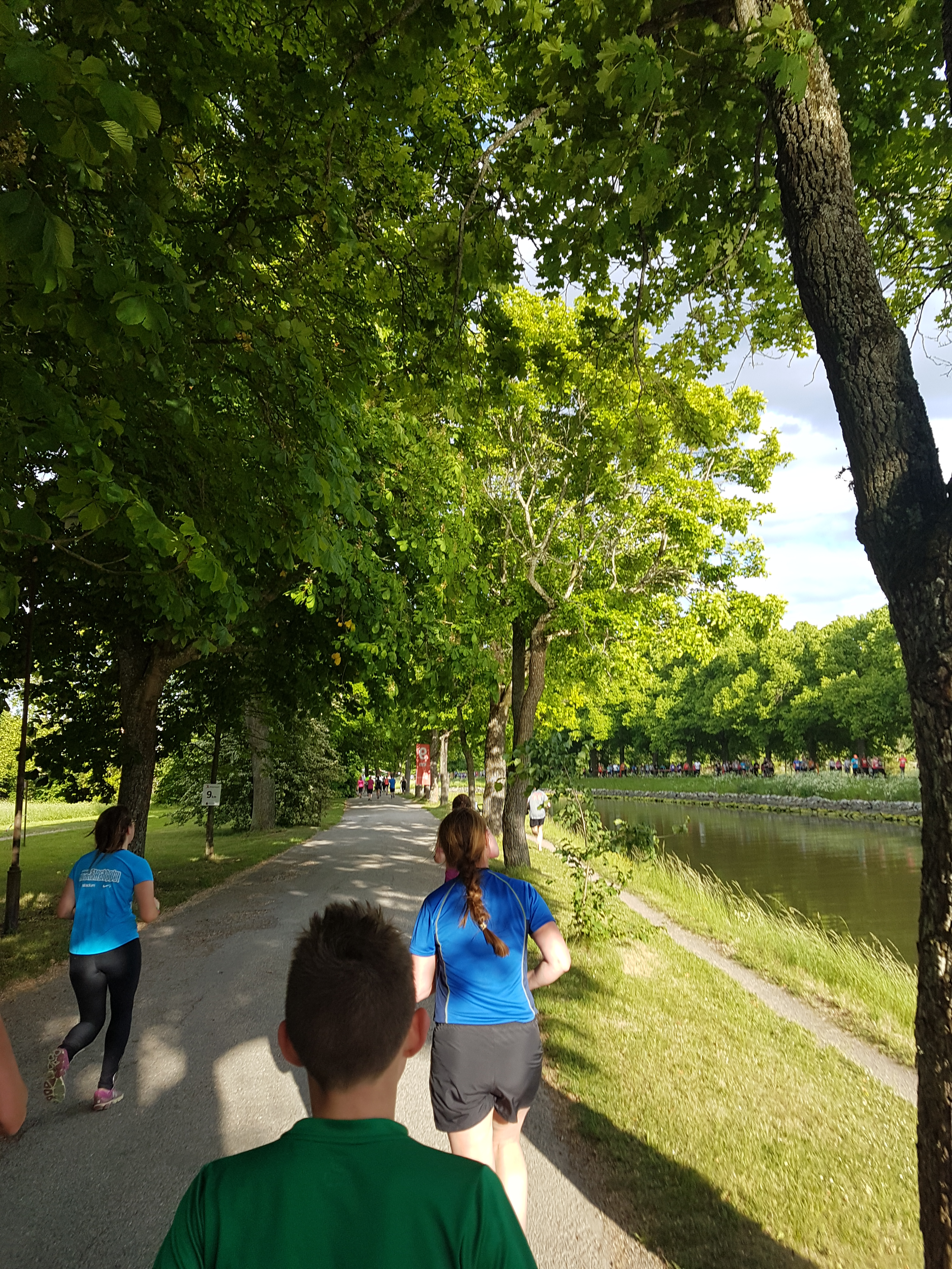 Motionsloppet Blodomloppet i Stockholm 2016. Banan längs med Djurgårdskanalen.